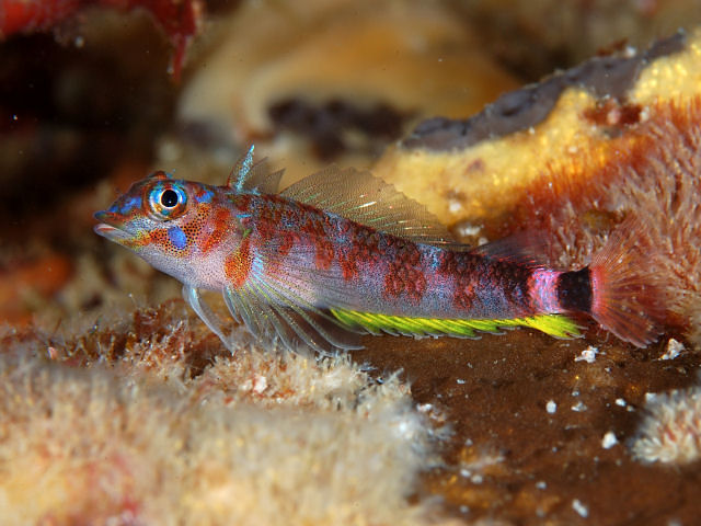 キビレヘビギンポ Enneapterygius senoui